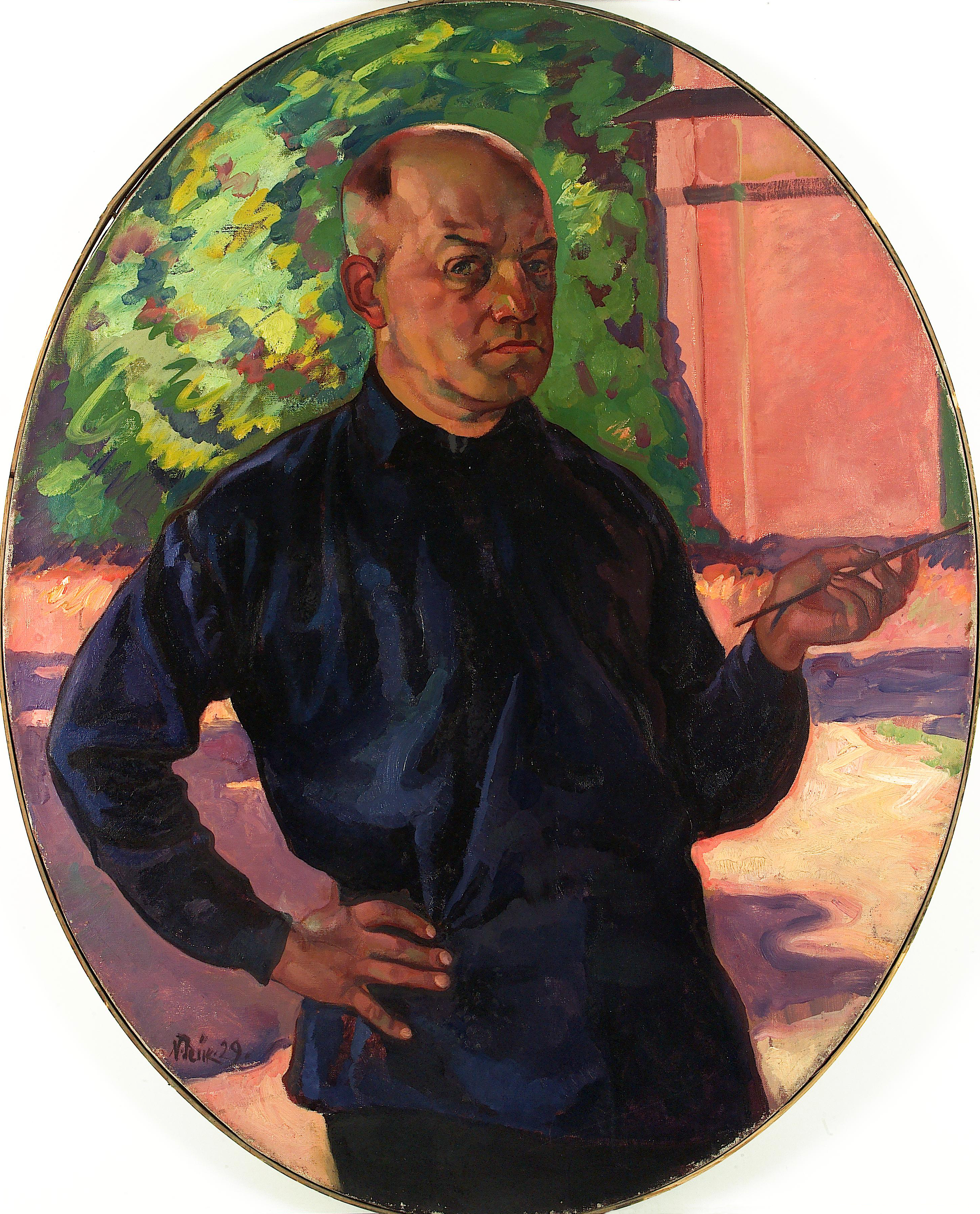 Muuseumikogu Maal Olemus maal Originaal originaal Kunstiese Lisanumbrid foto number: 3479F; foto number: 2007F; negatiivi number: 3479N; negatiivi number: 2007N; negatiivi number: 541N Säilivus rahuldav